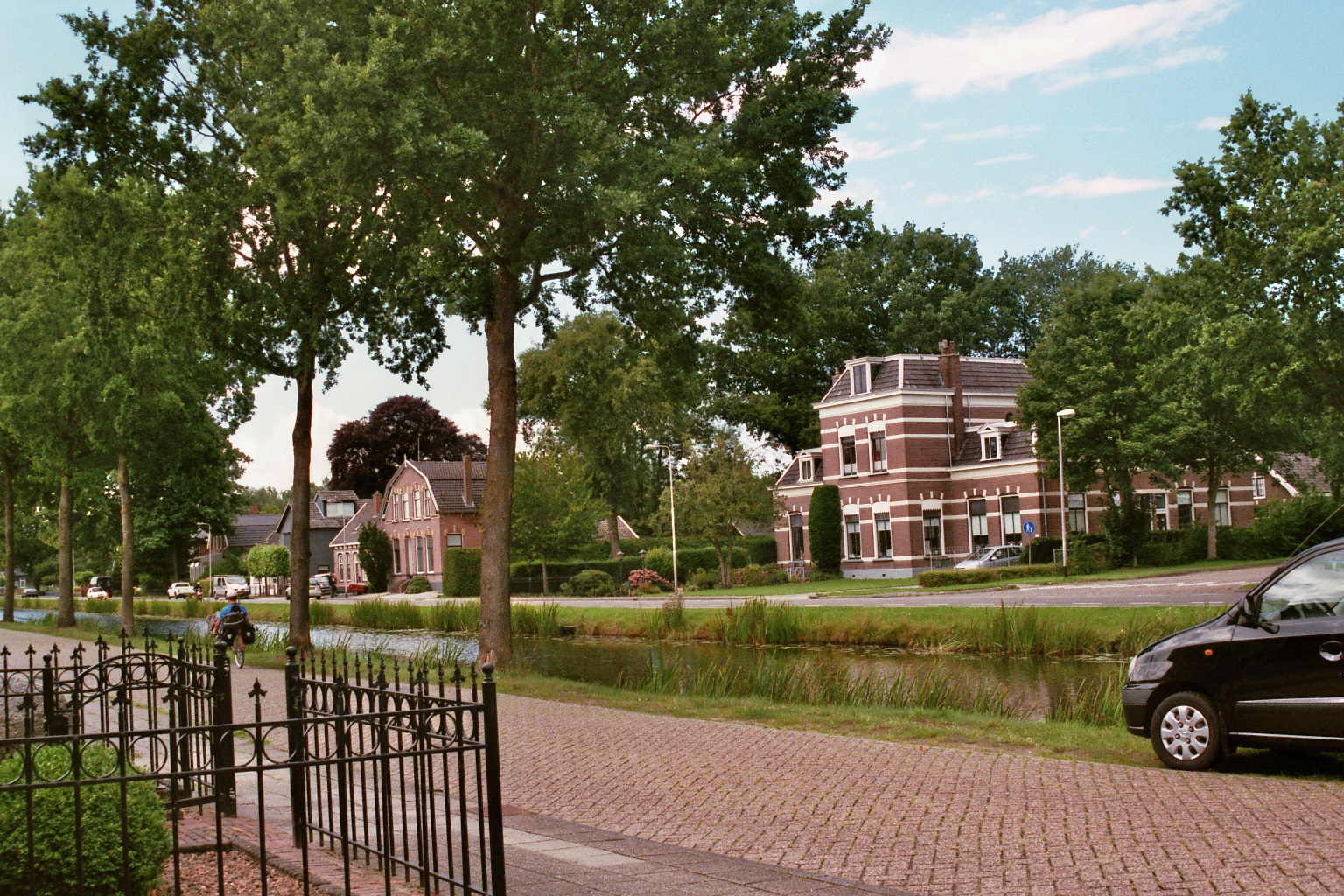 Aan de overzijde van het kanaal de Dedemsvaart staat Hoofdvaart 53-59, het voormalig hoofdkantoor van de Dedemsvaartsche Stoomtramweg-Maatschappij (DSM). Het is een gemeentelijke monument van de gemeente Hardenberg. Het pand bestaat anno 2017 uit diverse woonhuizen. Gebruikte camera is Canon Eos 3000, gebruikte film is Fujifilm Superia X-tra 400 ISO This is an image of a municipal monument in Hardenberg with number wikinr18